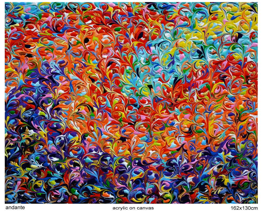 Un œuvre d'Eduardo Gulfenbein "Andante"